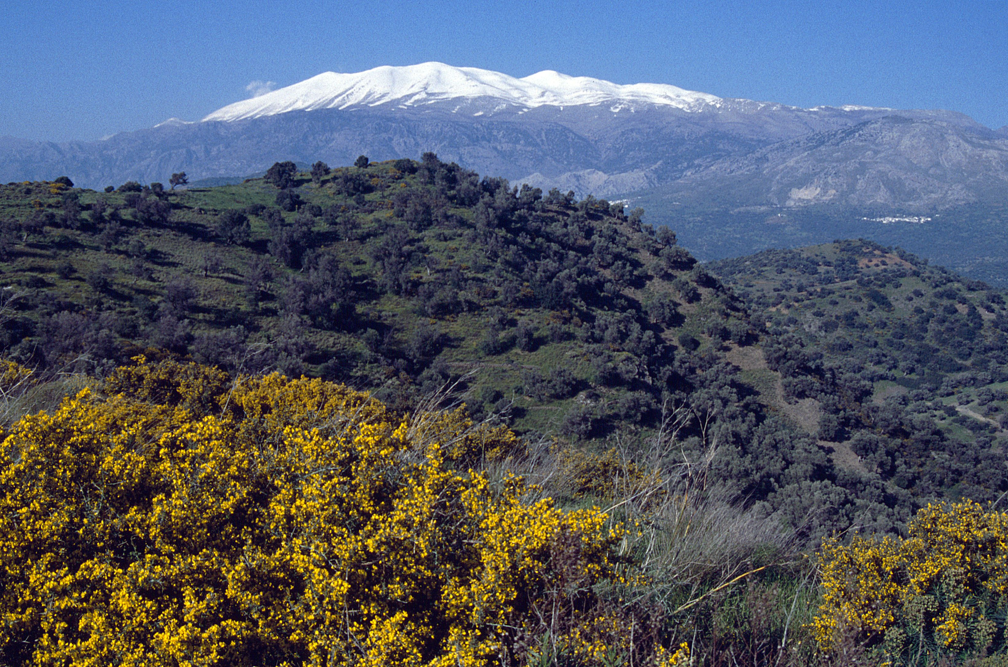 Blick von Phaistos auf das Ida-Gebirge